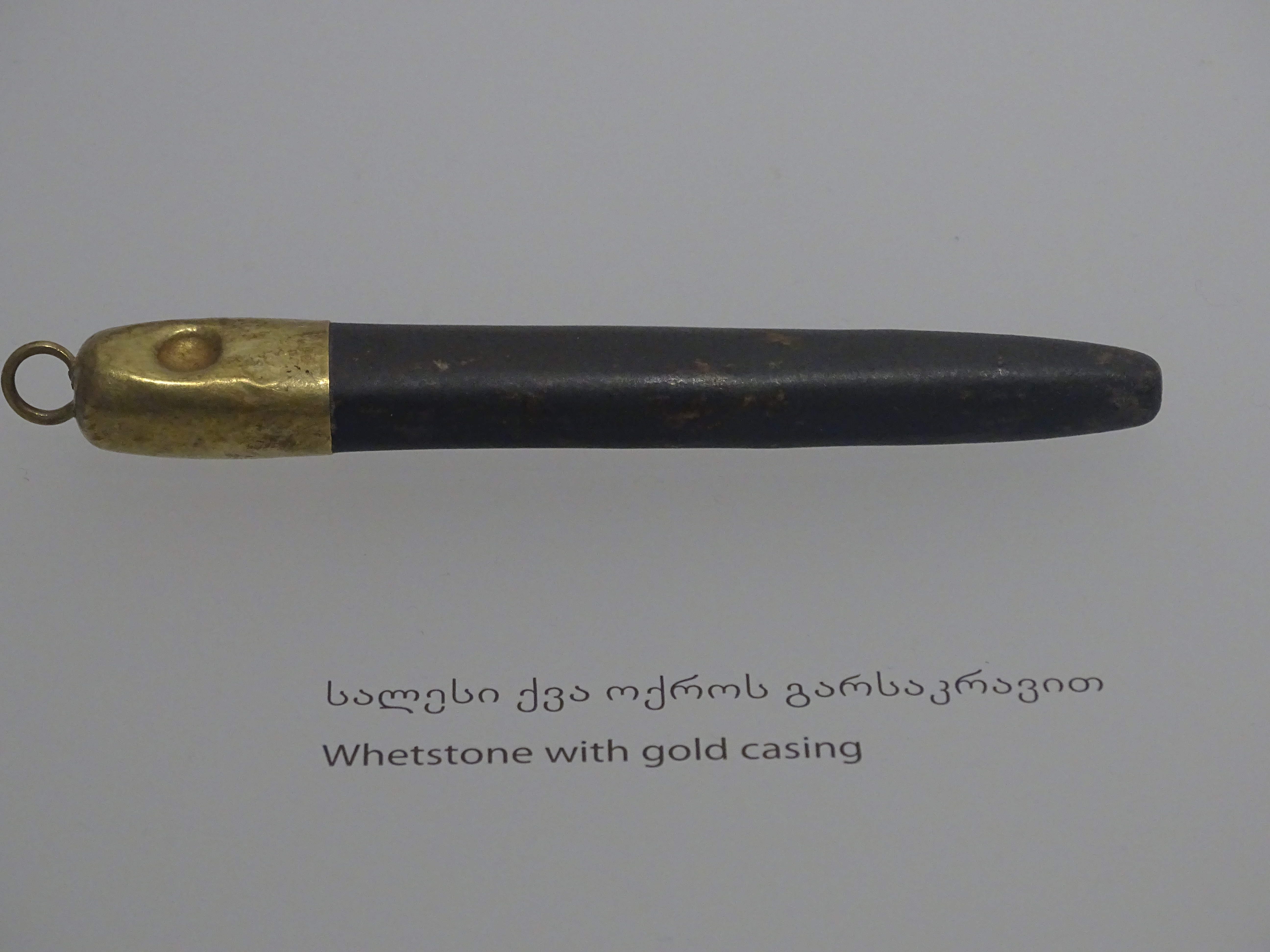 Wetzstein mit goldener Fassung, Aufnahme aus dem Nationalmuseum Tiflis